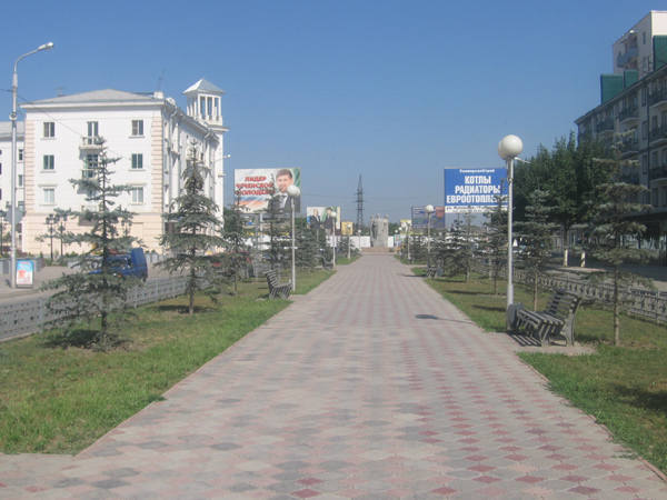 Проспект Победы в Грозном